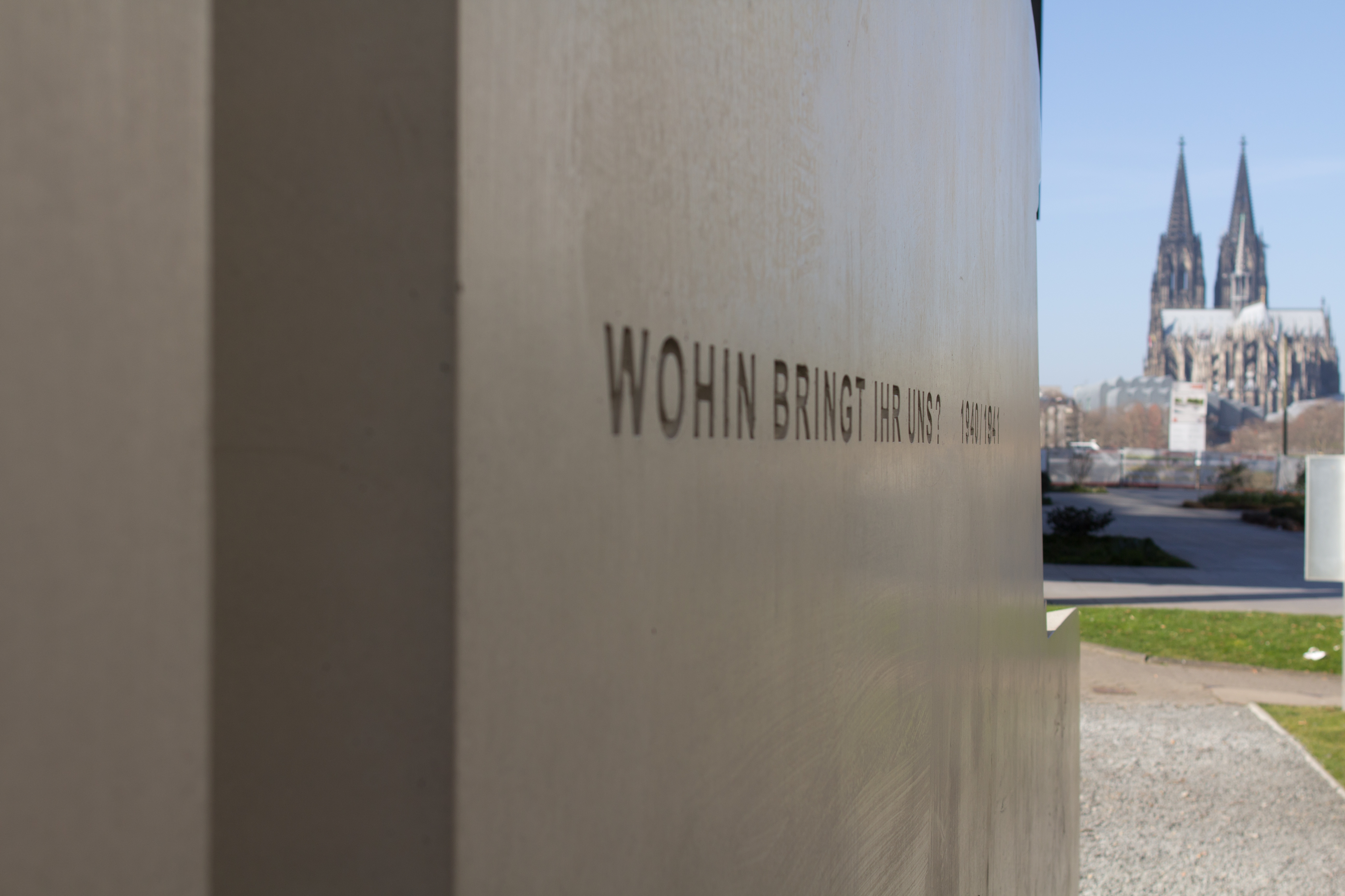 Denkmal der grauen Busse, von Horst Hoheisel und Andreas Knitz, Replika, dauerhaft platziert vor dem Landeshaus des LVR in Köln-Deutz. (Detail im Inneren mit der Inschrift „Wohin bringt Ihr uns 1940/1941)